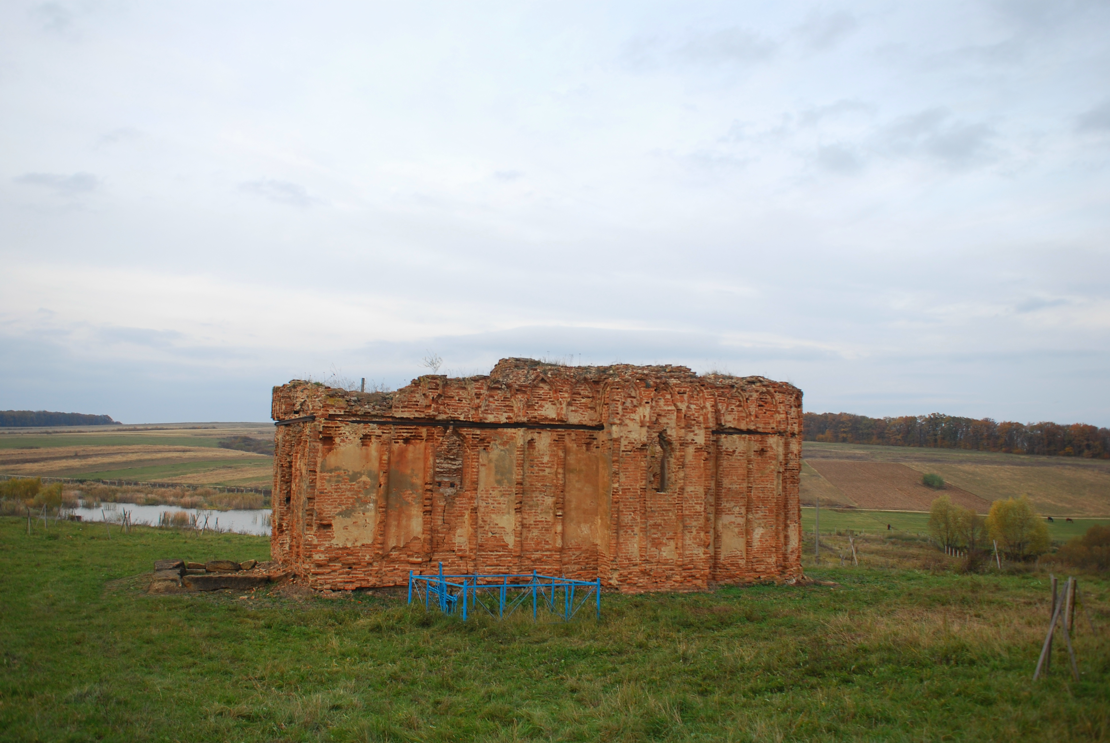 Biserica "Vovidenia" 01